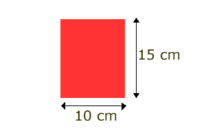 La tella de ferro que s'usa actualment sol tenir aquesta mida aproximada. Així i tot, la tella de cada jugador varia considerablement en quant a pes, mida i forma.